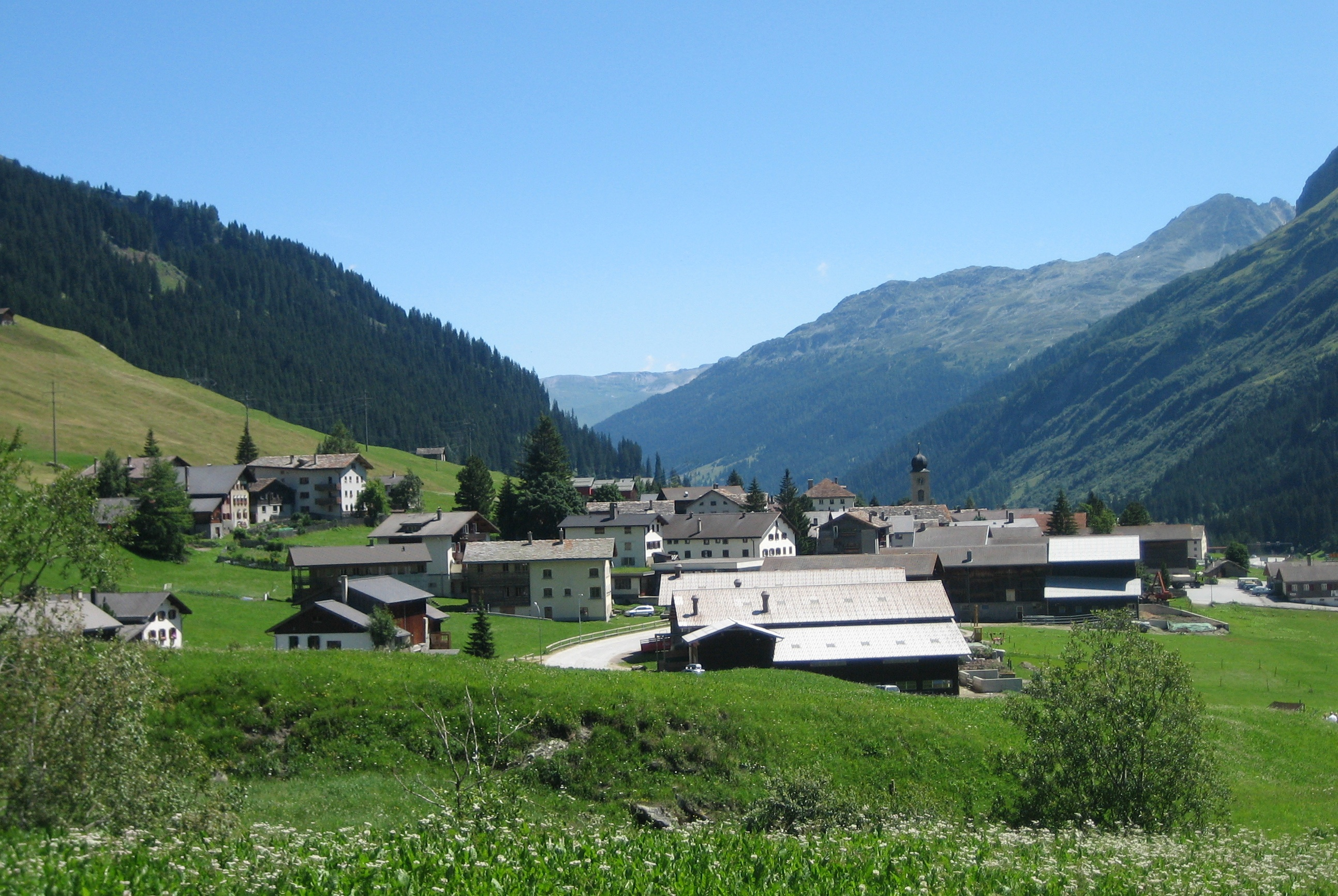 Nufenen im Rheinwald GR